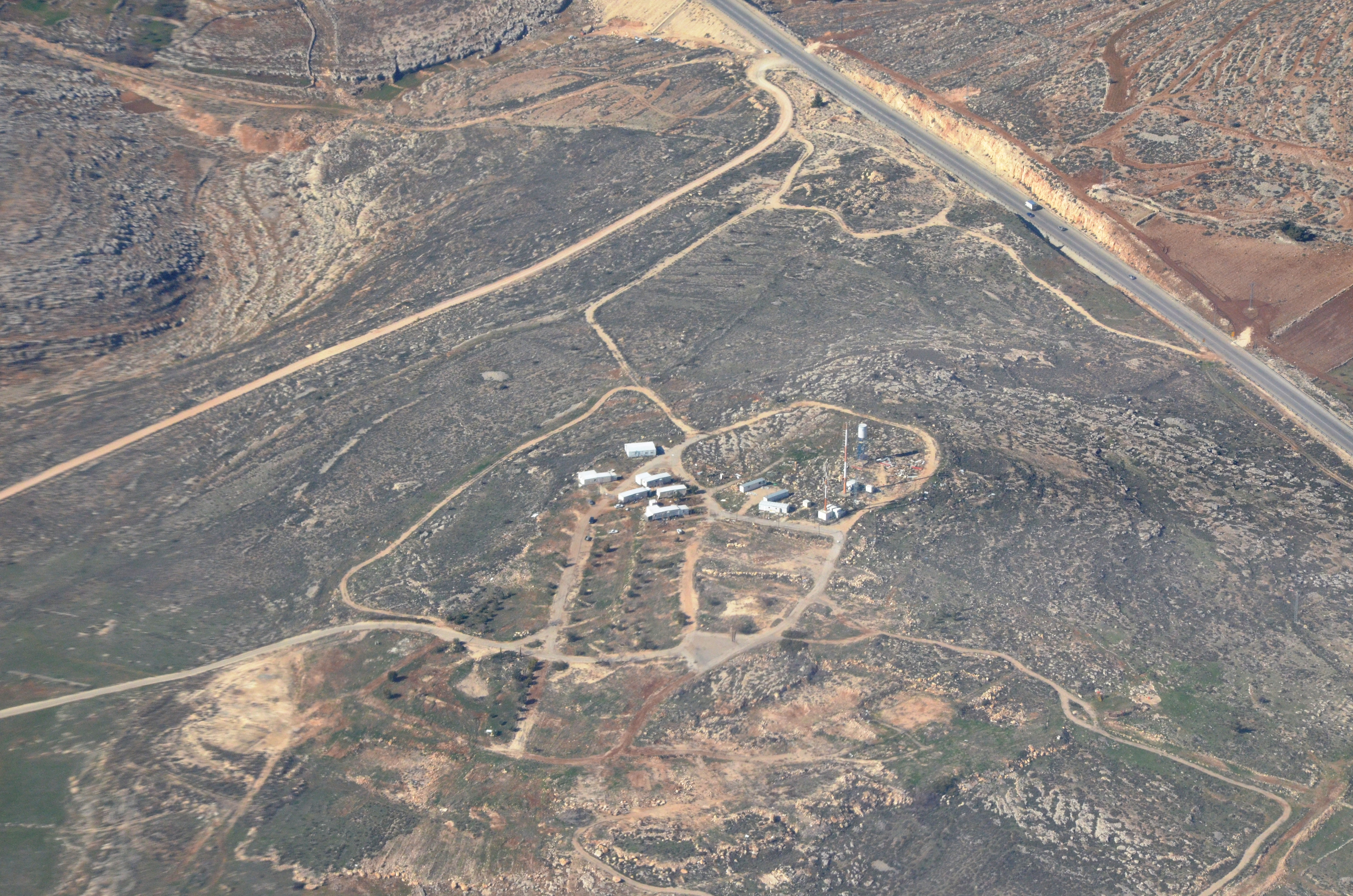 מגרון הישנה